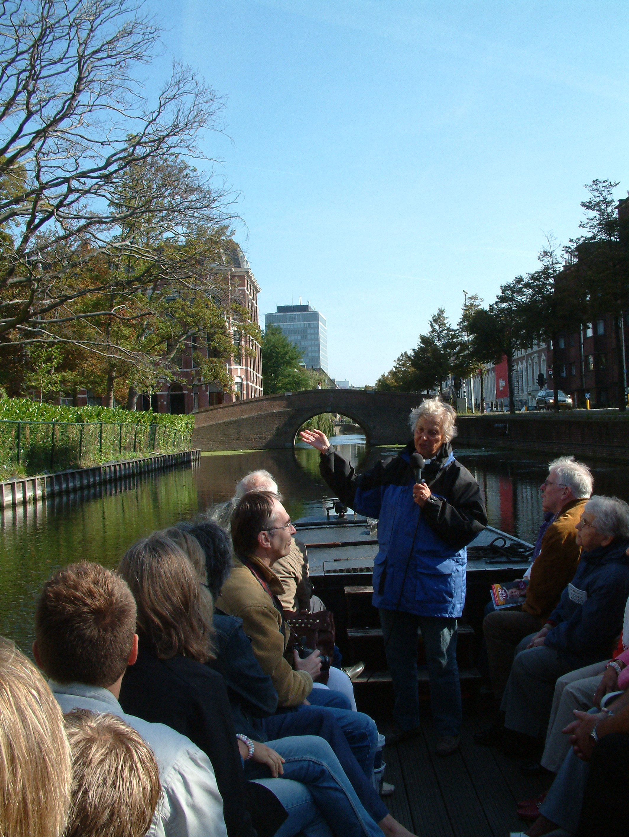 Brug in Den Haag